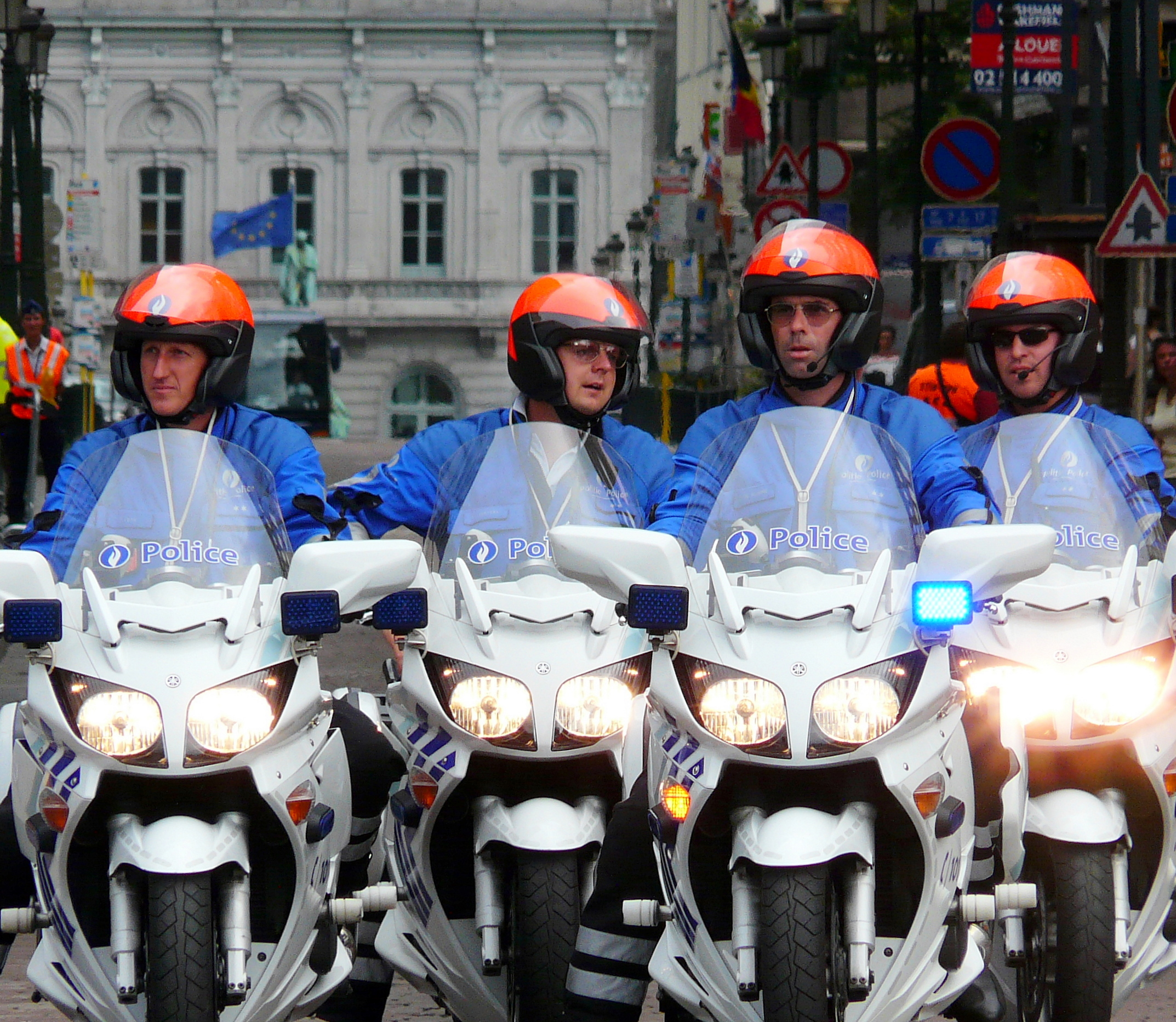 Motorised police in Brussels, july the 21st, 2009. On the left : a Bourvil look-a-like? In Vlaanderen spreken we over de "zwaantjes" om de bereden politie aan te duiden (Urbanus heeft er een sketch over). Die ene lijkt trouwens wat op Bourvil of vergis ik me??